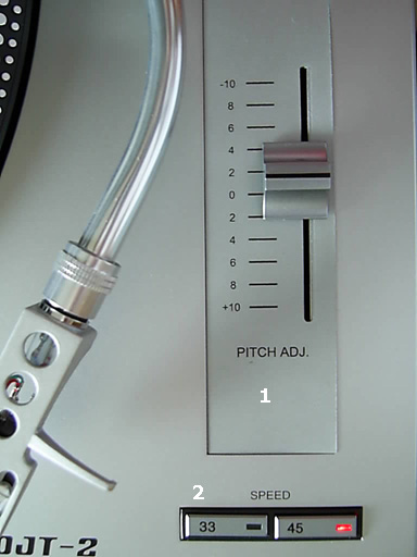 1. Pitchregler im Bereich +10 und -10; 2. Speedregler 33/45